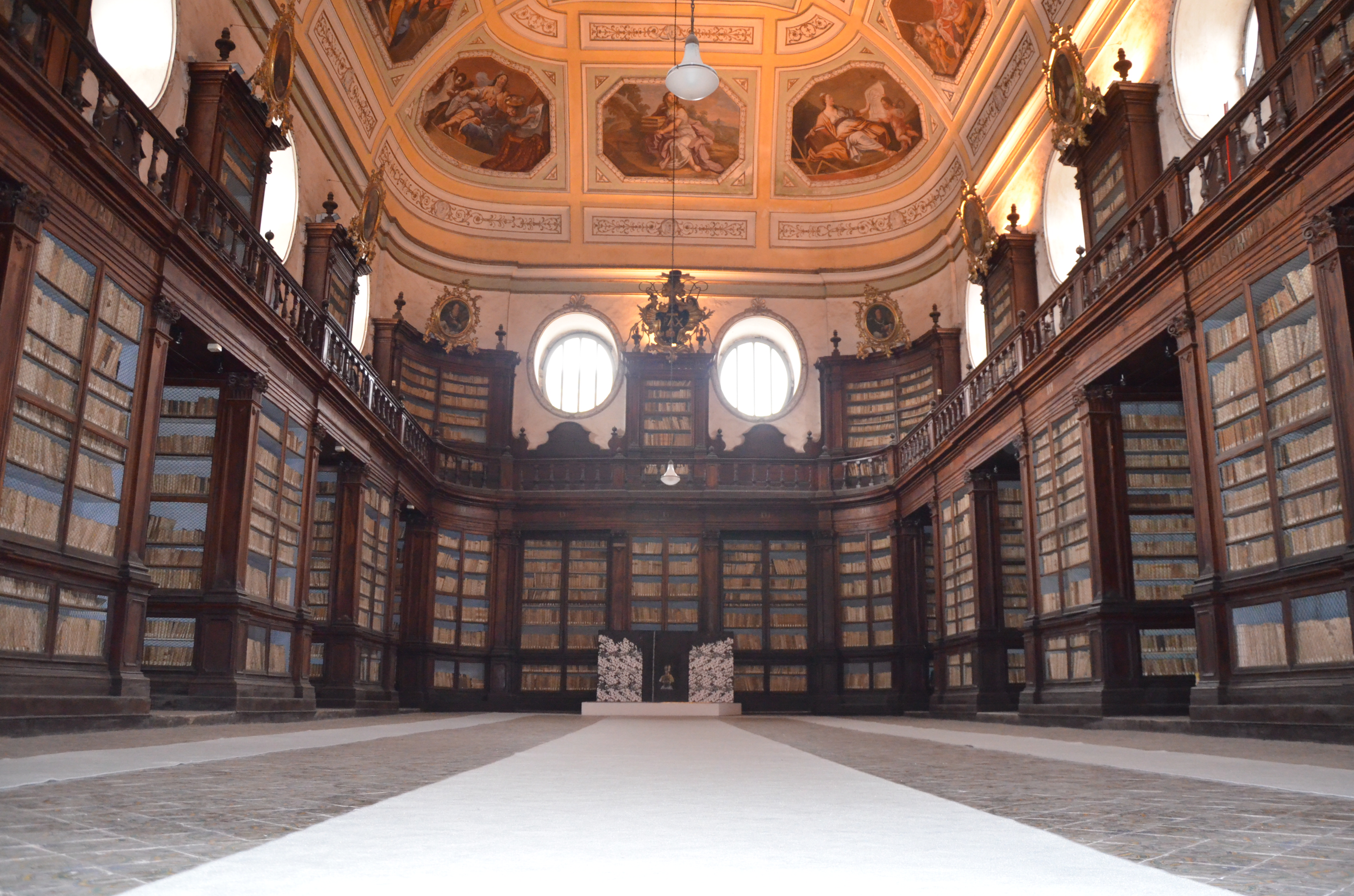 Sala Vaccarini 2013